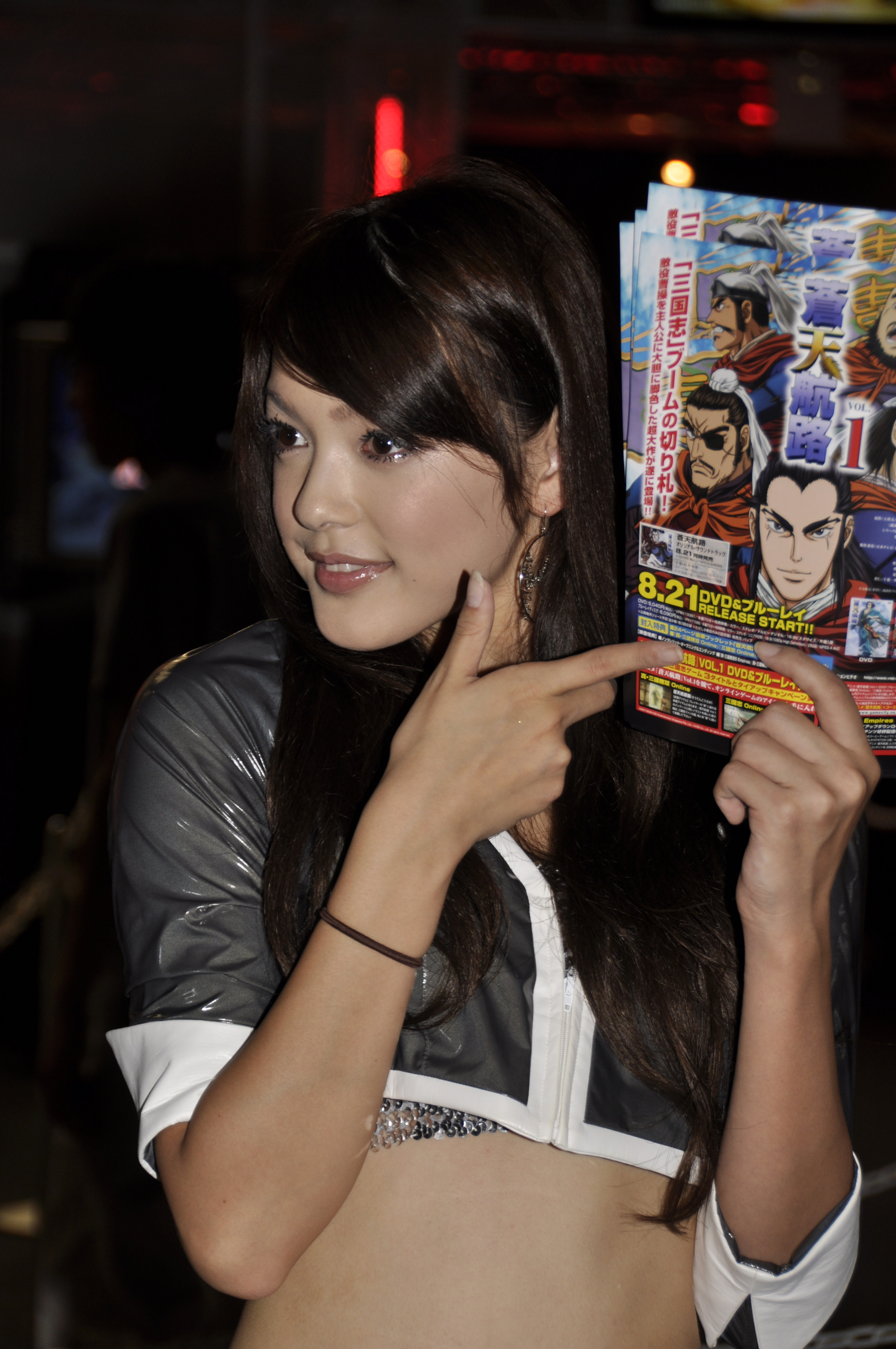 永井麻央、東京ゲームショウ2009